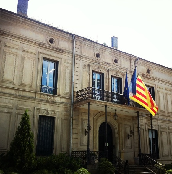 Hôtel de ville de Prades (Pyrénées-Orientales) - Château Pams